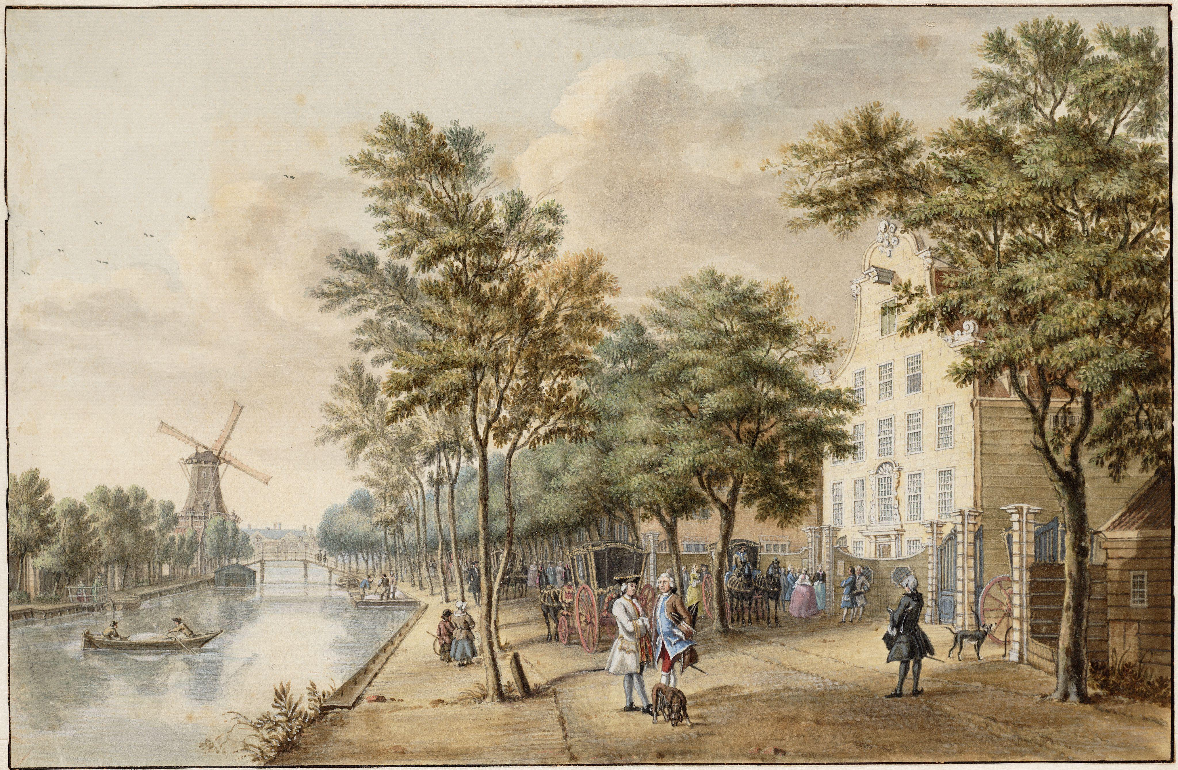 Jan de Beijer. Overtoom met links de Overtoomsevaart met in het verschiet de Luie Brug aan het begin van de Overtoom. 1753. drawing. Amsterdam, Stadsarchief Amsterdam, Collectie Atlas Splitgerber.